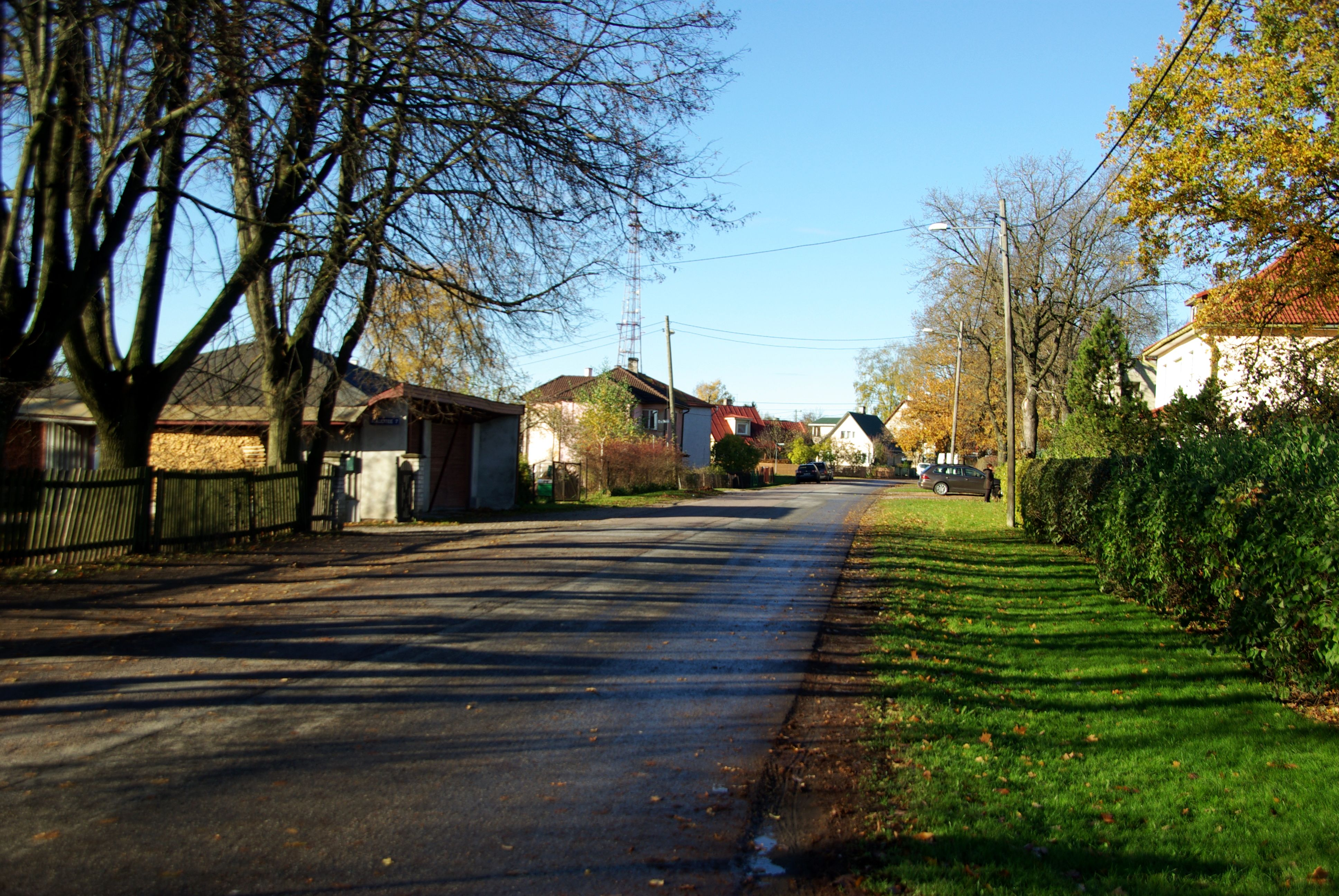 tänav Tartus Tammelinnas